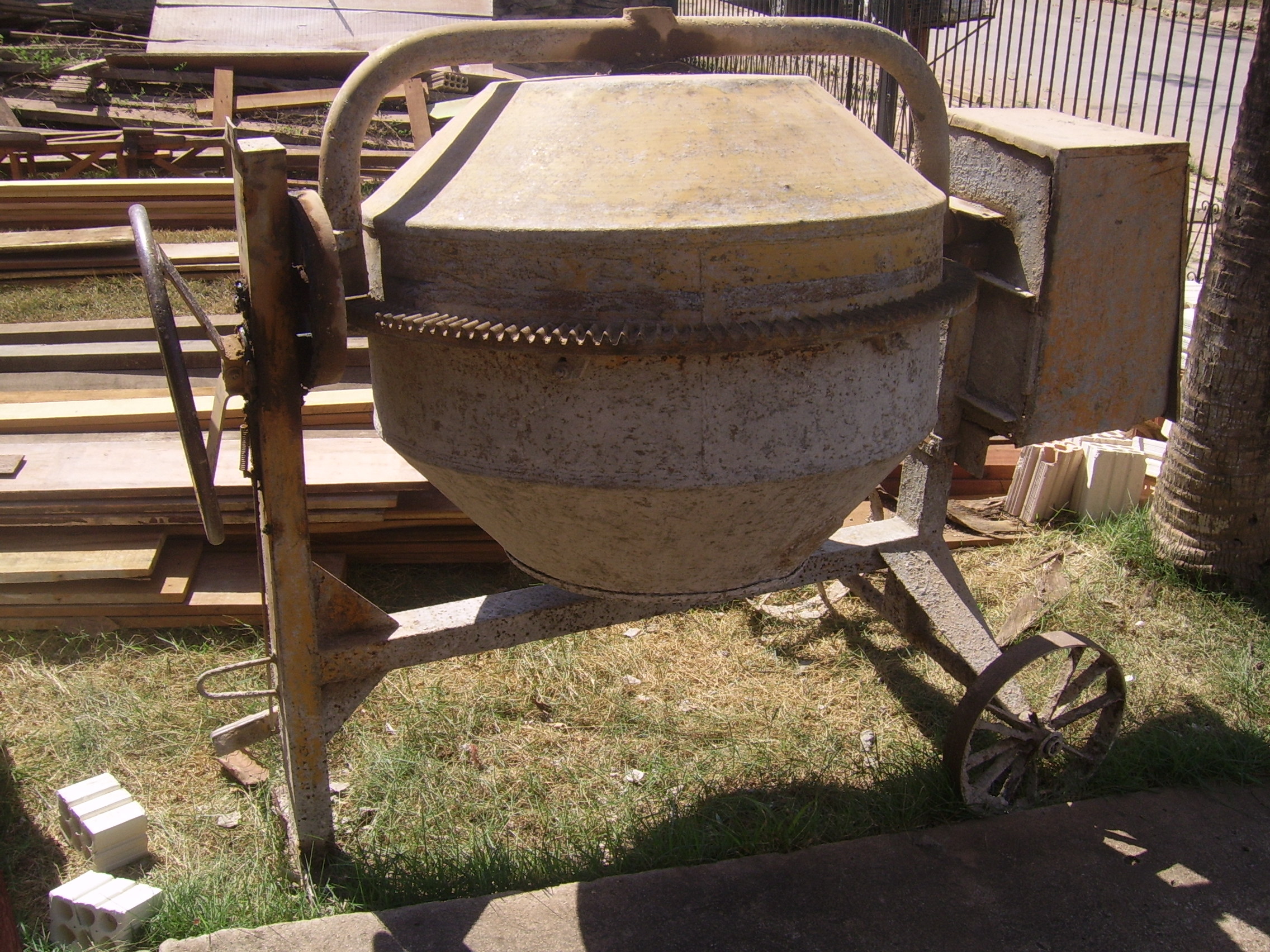 Betoneira muito utilizada no Brasil.